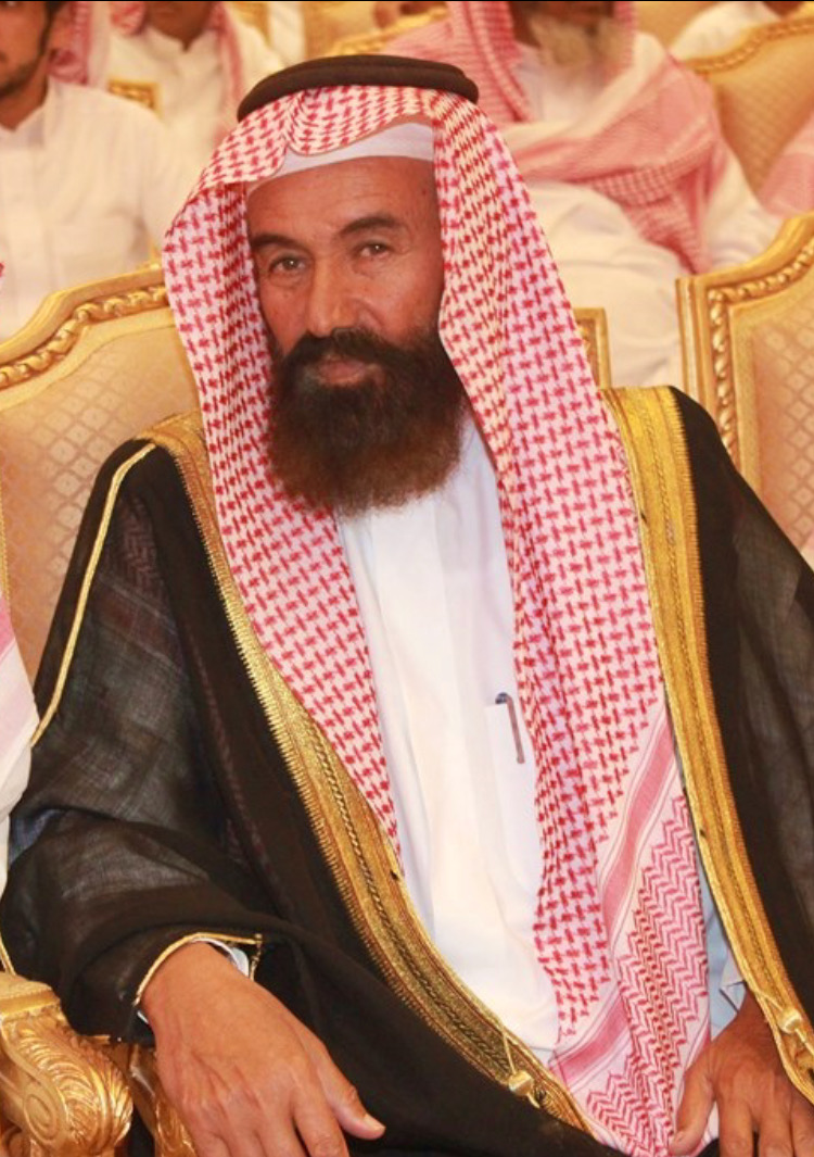 الشيخ مطر القوس مؤسس مركز الرويلية الصهلوج ورئيسه السابق، شيخ قبيلة القوسه من المراشدة من عتيبة